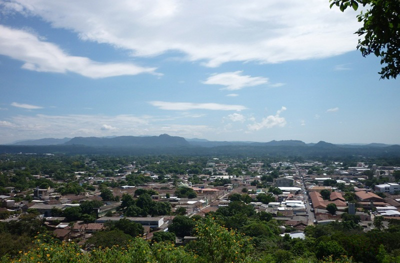 vista parcial de la ciudad de sonsonate desde lo alto de la loma del cementerio.